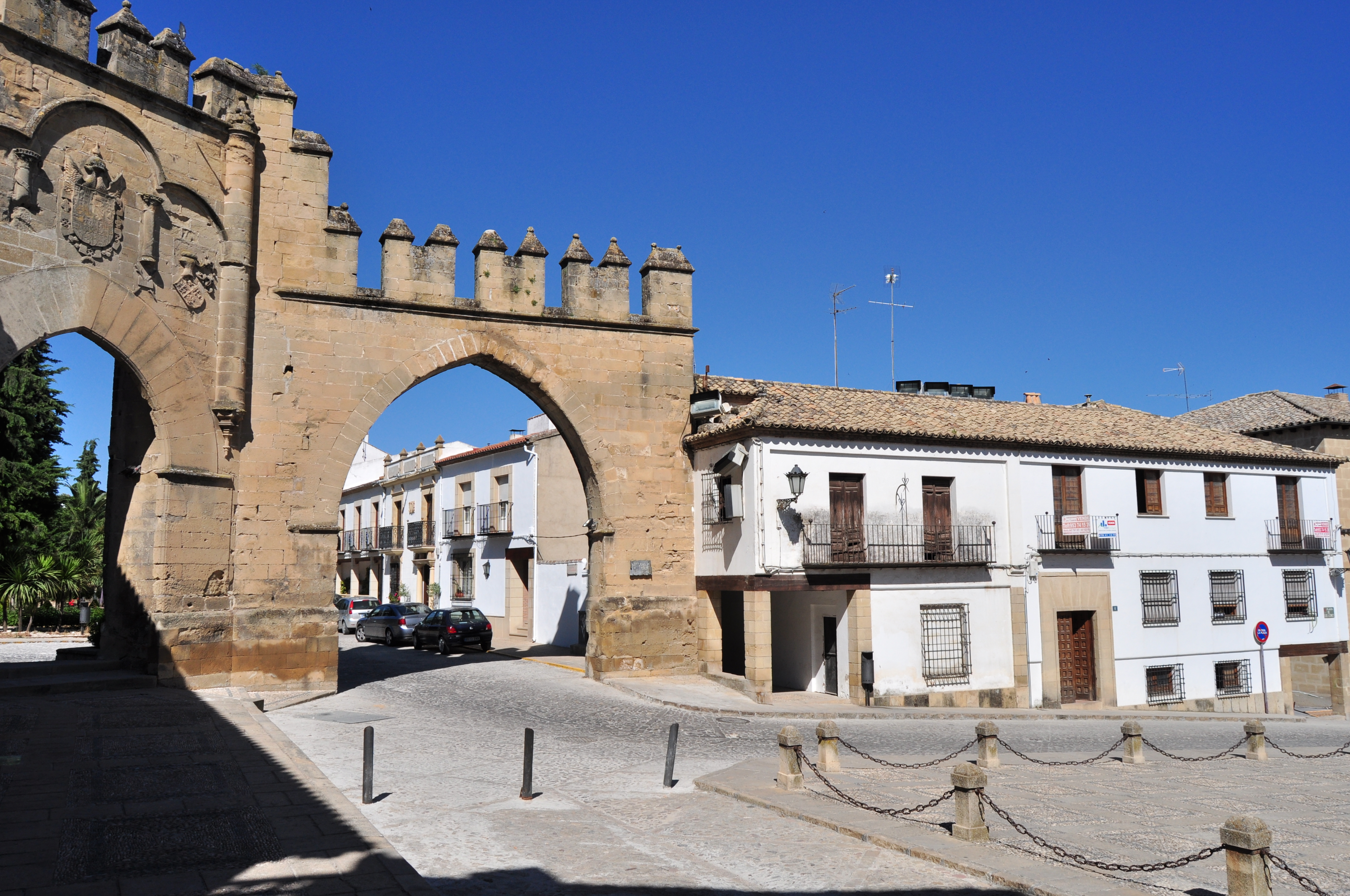 Baeza - 066